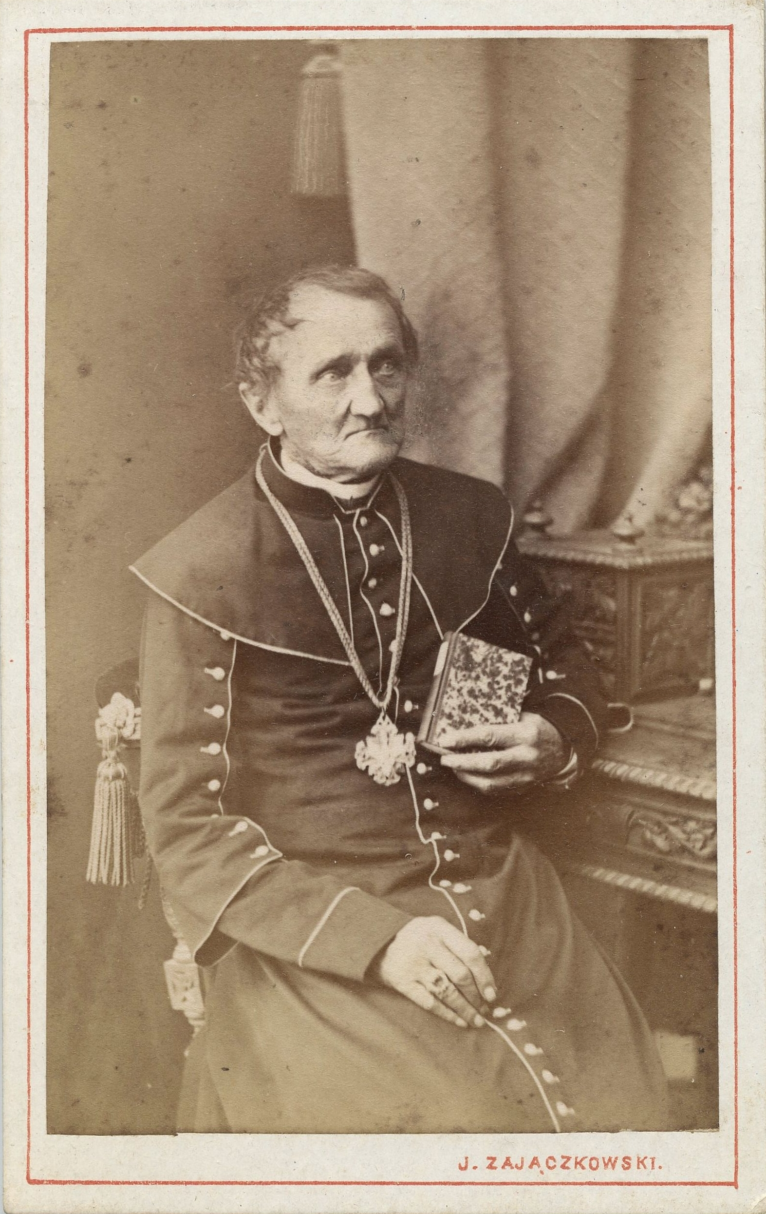 Leopold Olcyngier (1805-1884) proboszcz w Tyczynie, dziekan rzeszowski, poseł na Sejm Krajowy Galicji; zdjęcie z kolekcji Jacka Dehnela